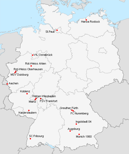 Liste des clubs participants à la bundesliga 2 2008-2009